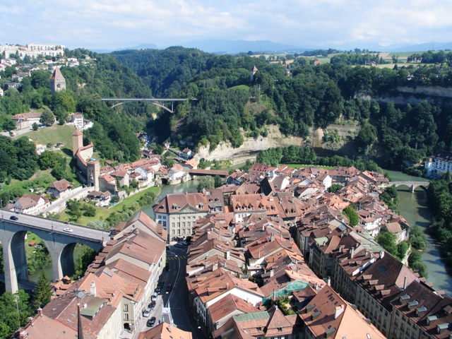 Ville de Fribourg, vue depuis la cathédrale. Auteur: Delley Sébastien